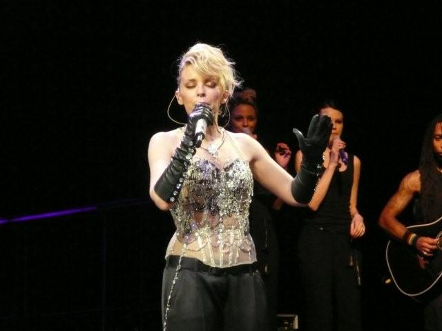 KylieX2008